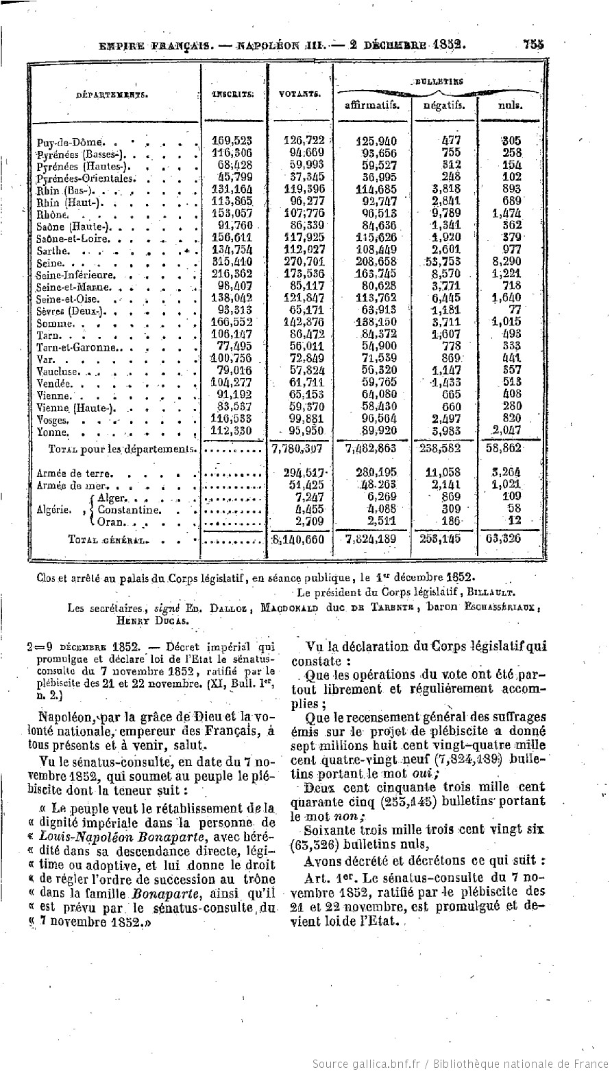 Résultats du plébiscite du 21 et 22 novembre 1852 - Collection complète des lois, décrets, ordonnances, réglements, et avis du Conseil d'Etat